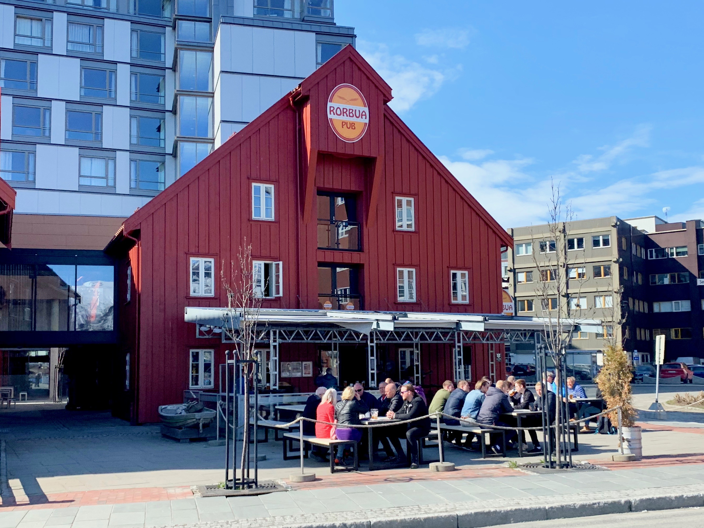 Rorbua i Tromsø.